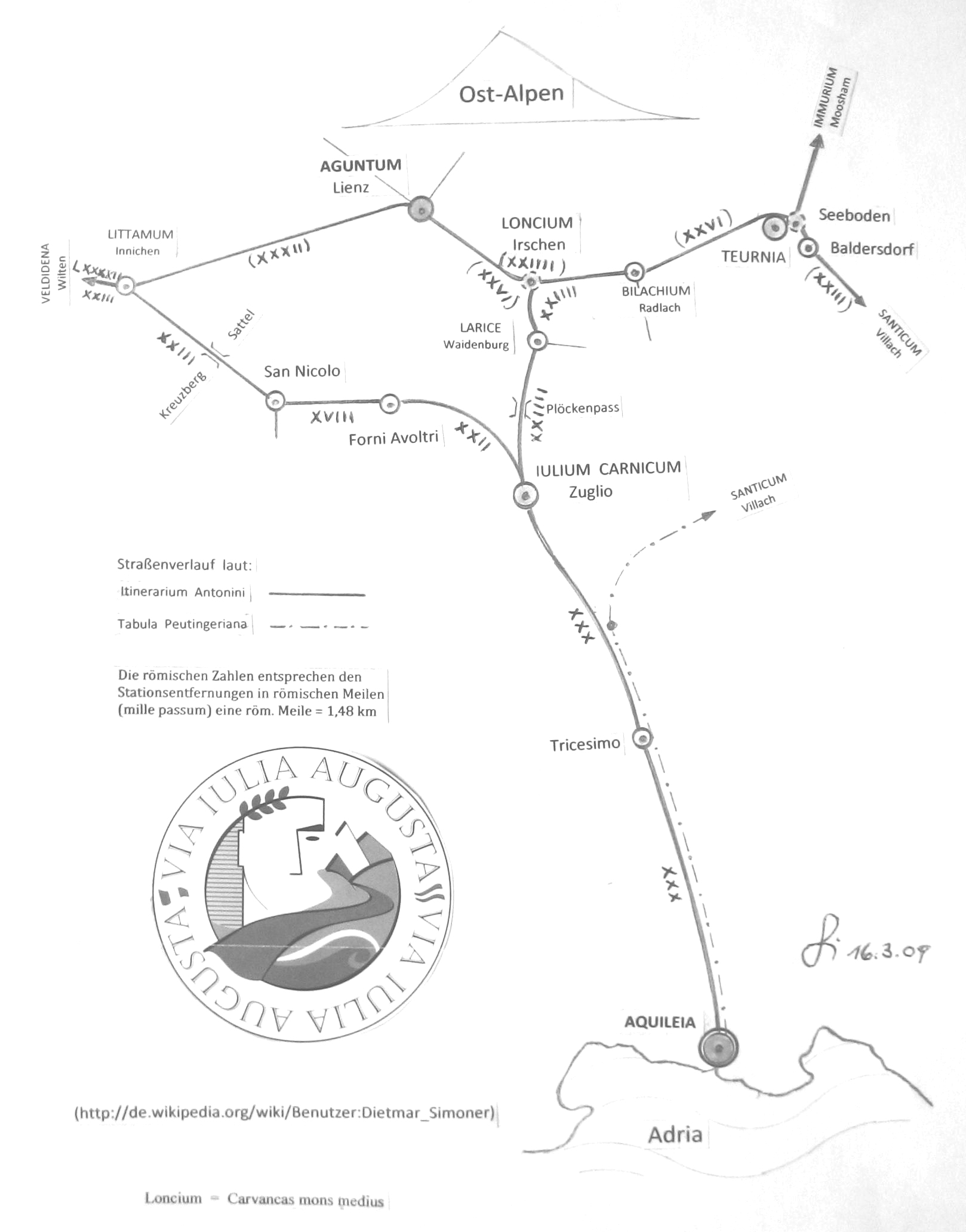 Skizze der Via Iulia Augusta